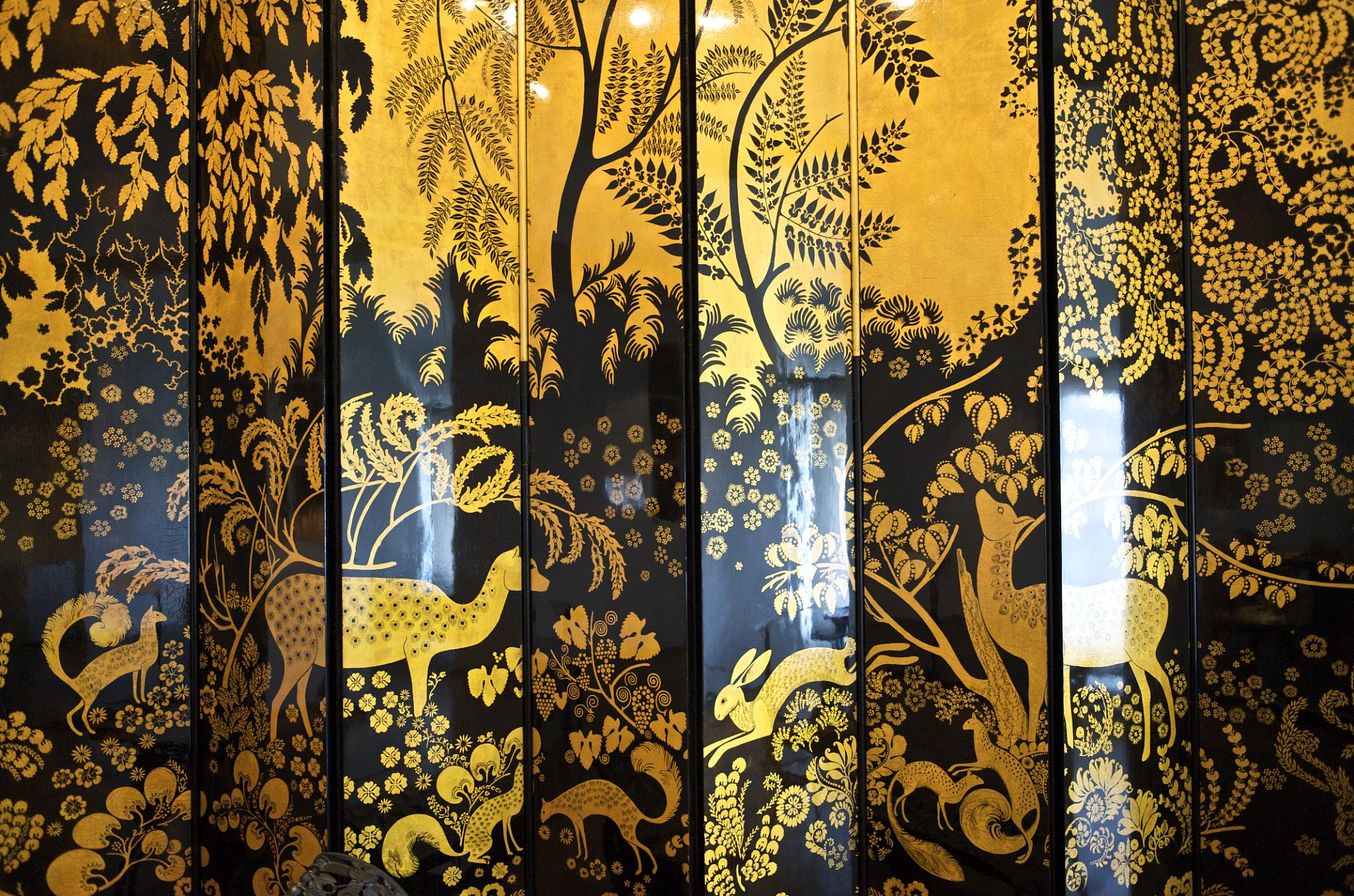 Armand-Albert Rateau (1882-1938): Paravent à dix feuilles, 1921/1922, bois laqué et doré provenant de l'ancienne salle à manger de l'appartement privé de l'hôtel particulier de Jeanne Lanvin (1867-1946), Musée des Arts Décoratifs, Paris, France.